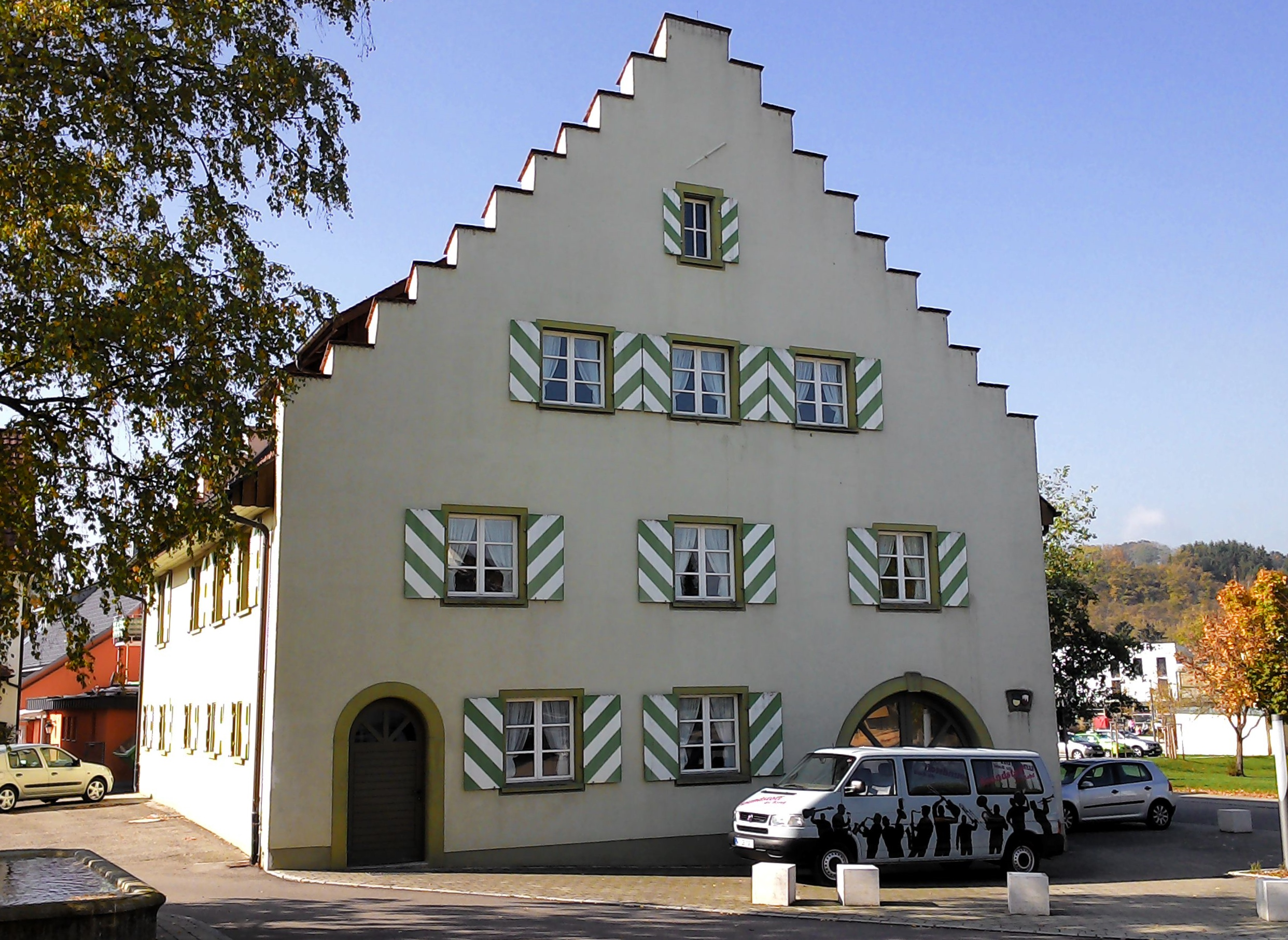 Wutöschingen, Landkreis Waldshut, Baden-Württemberg. Die Trotte als ältestes Bauwerk der Ortschaft.